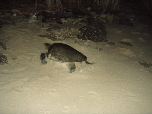 Schildkröte am Strand von Tutuala